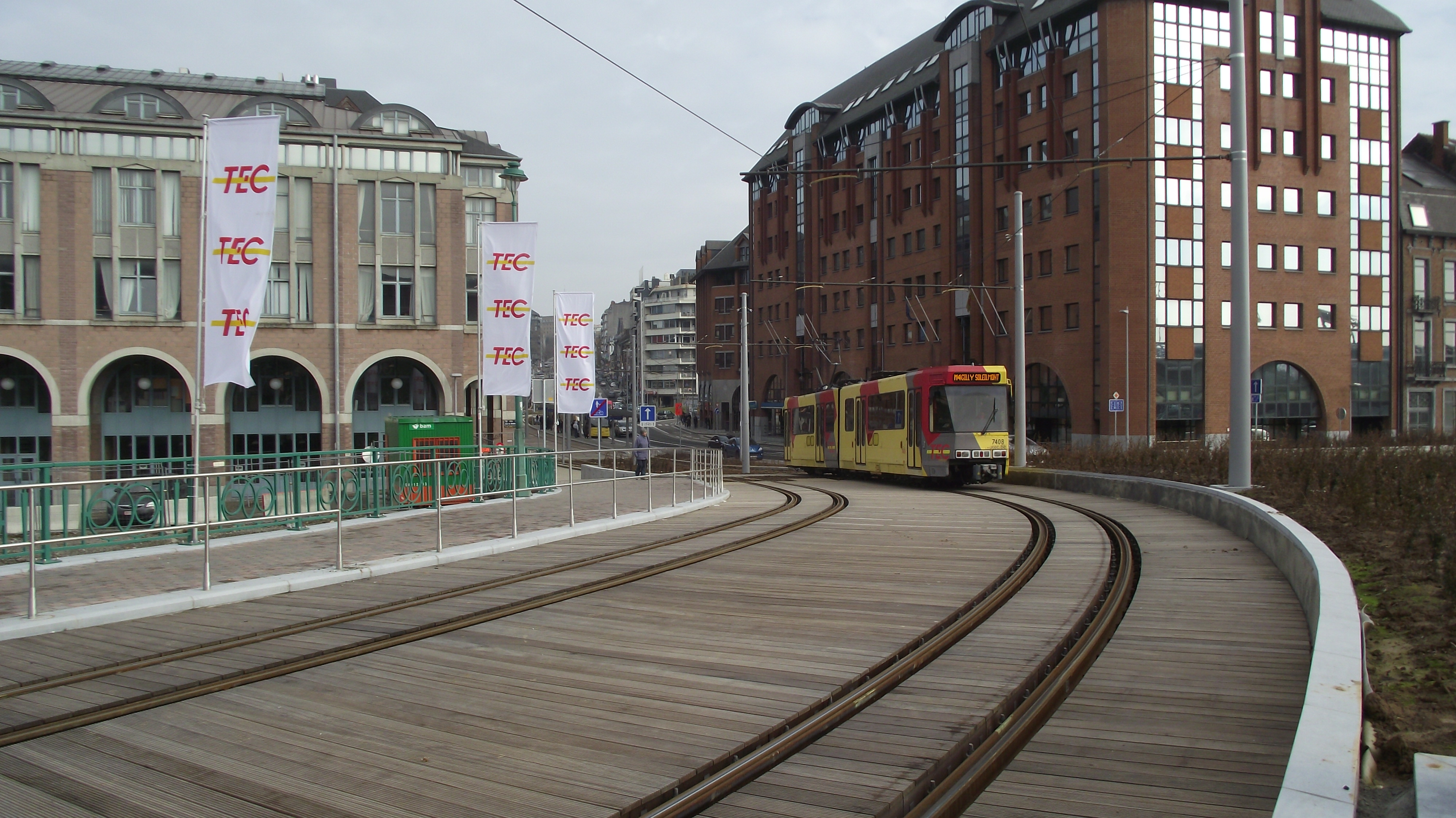 De M4 tram naar Soleilmont op de ringlijn in tegenwijzerzin na het oversteken van de brug over de Samber.